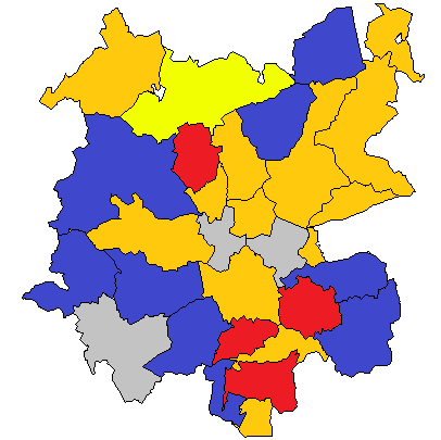 Mapa dels grups oplítics més votats a les eleccions municipals del 2019